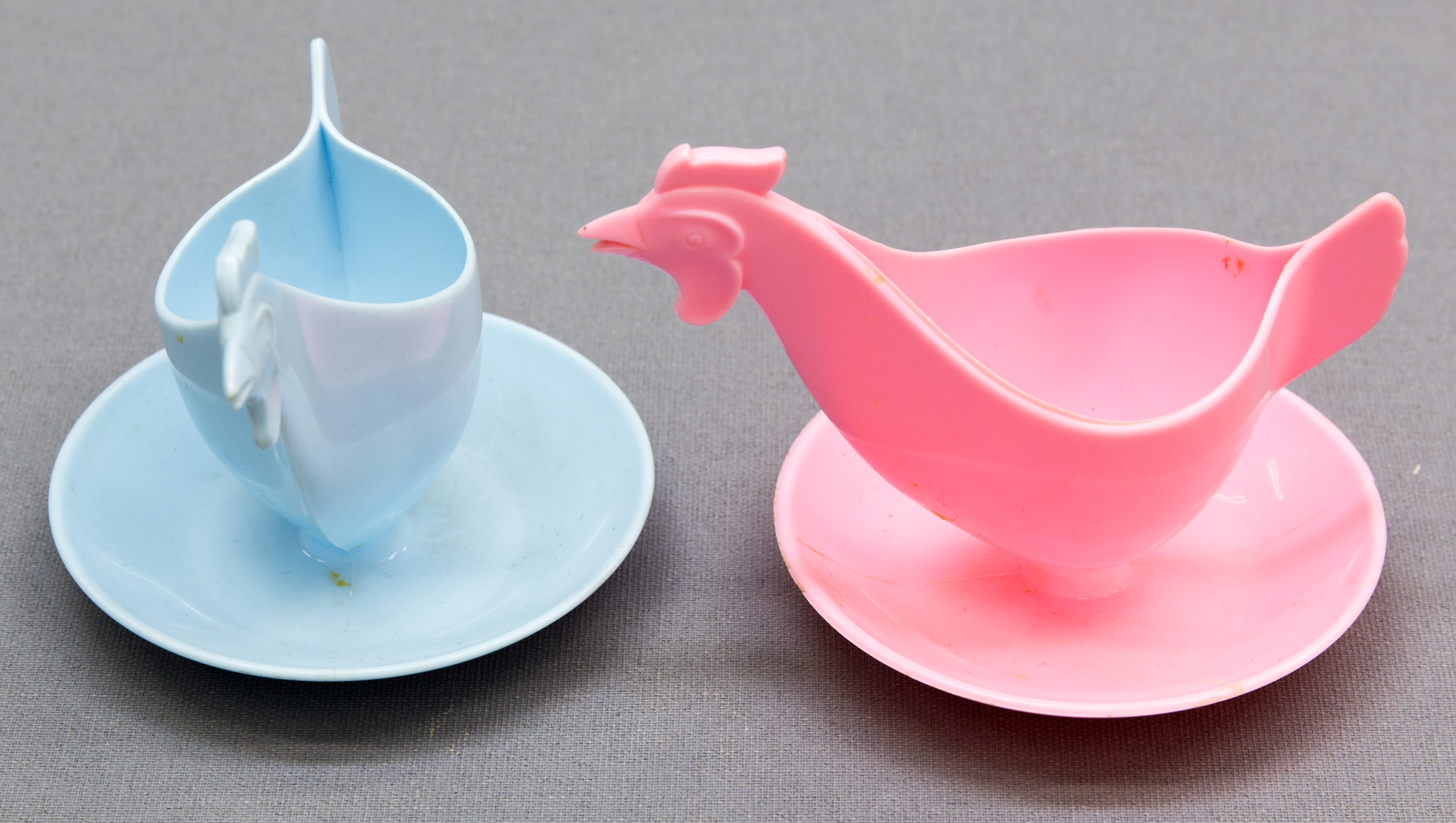 MVK 942/95